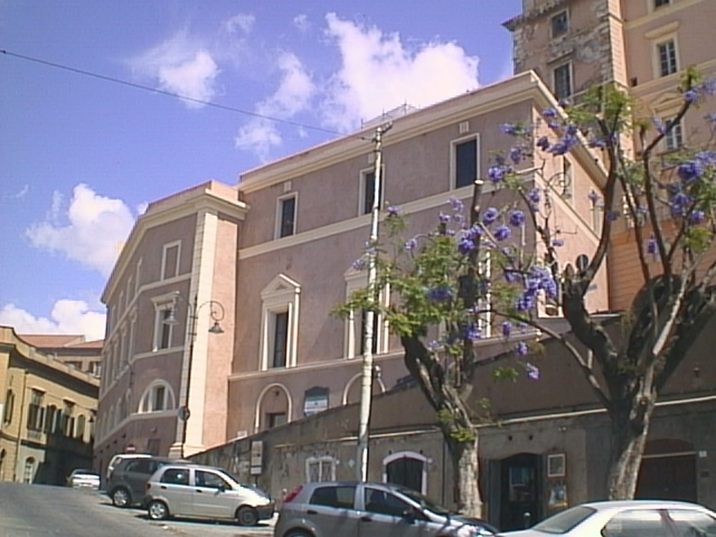 Teatro Civico di Castello, XIX secolo, Cagliari